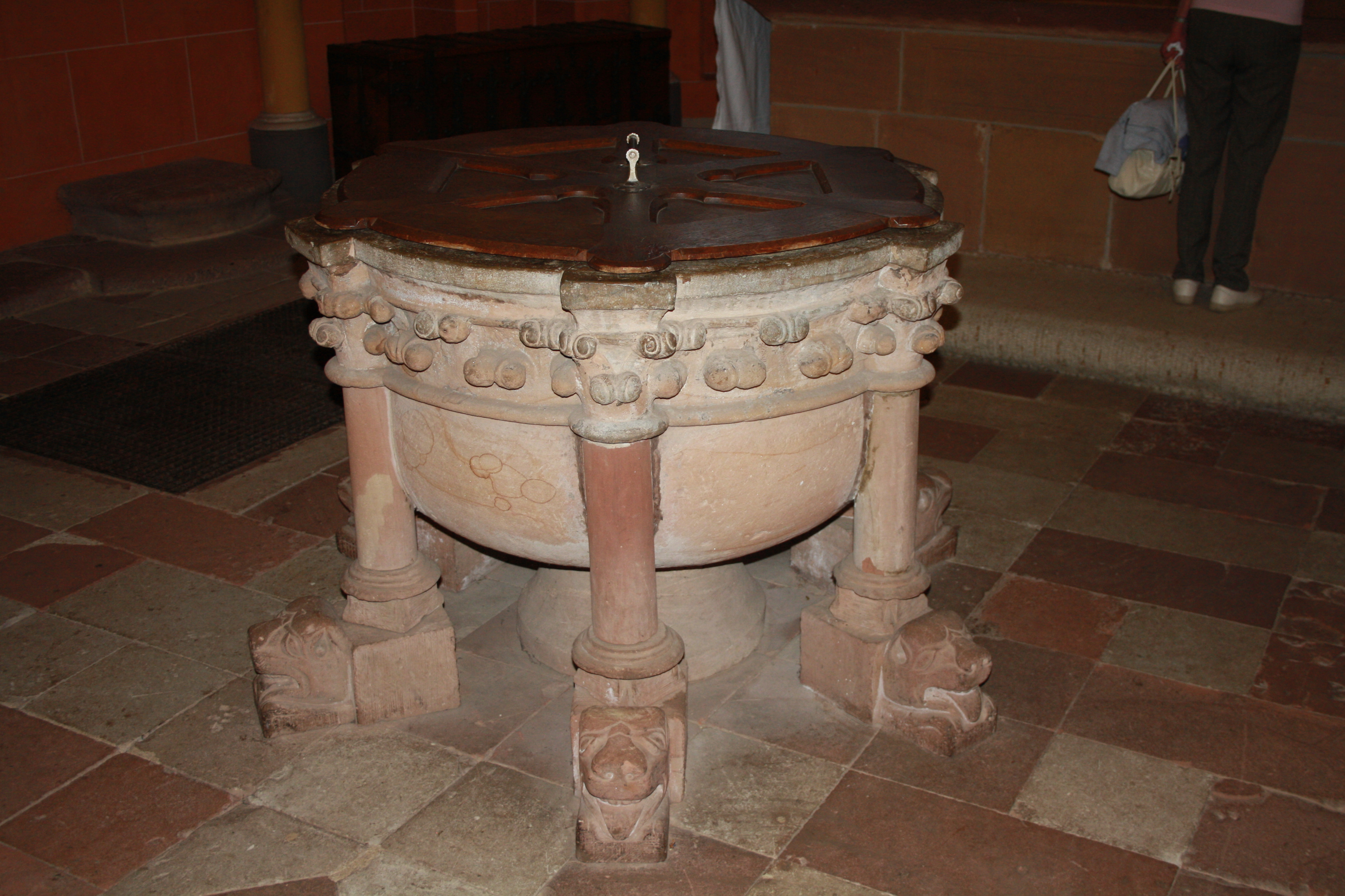 Taufbecken der Stiftskirche Wetter